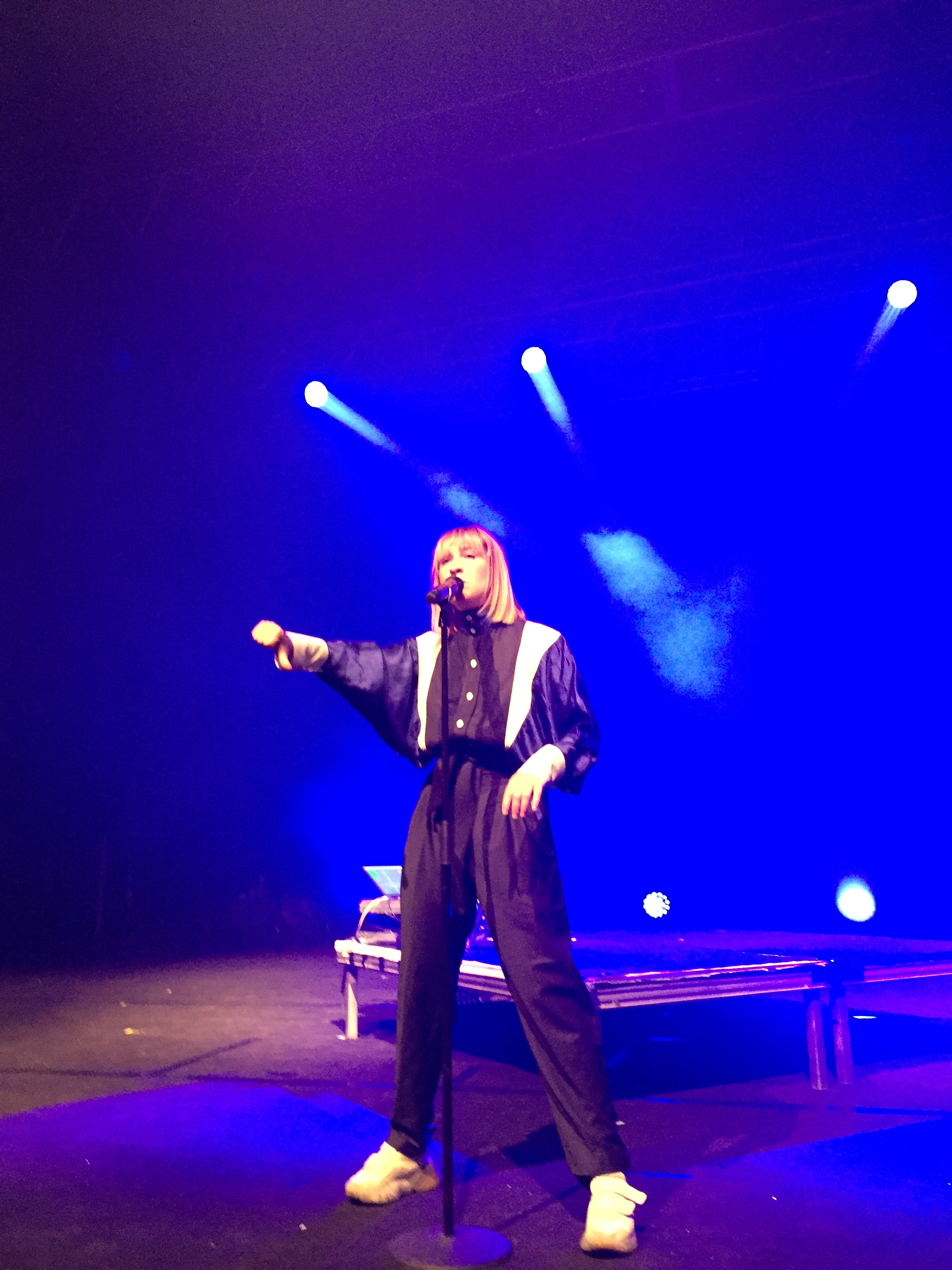 Suzane pendant le Ricard Live Tour à Lille